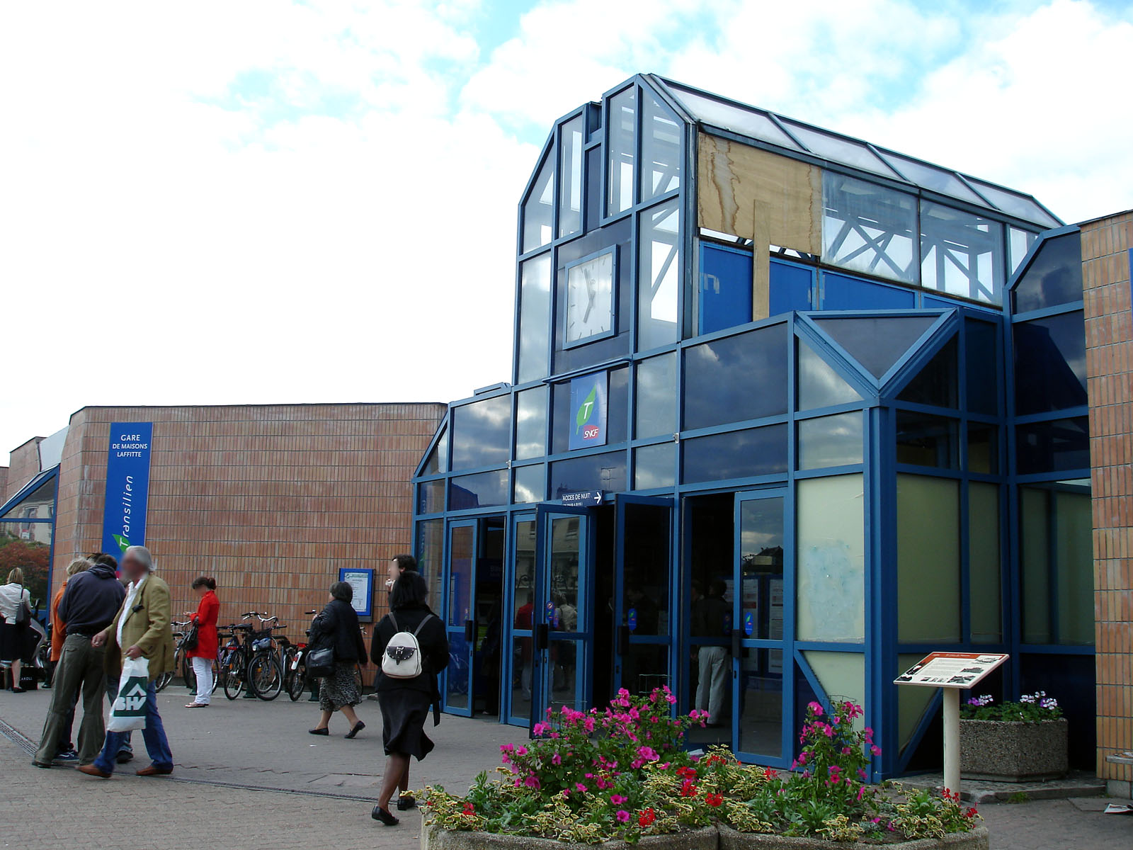 La gare de Maisons-Laffitte, Yvelines, France.